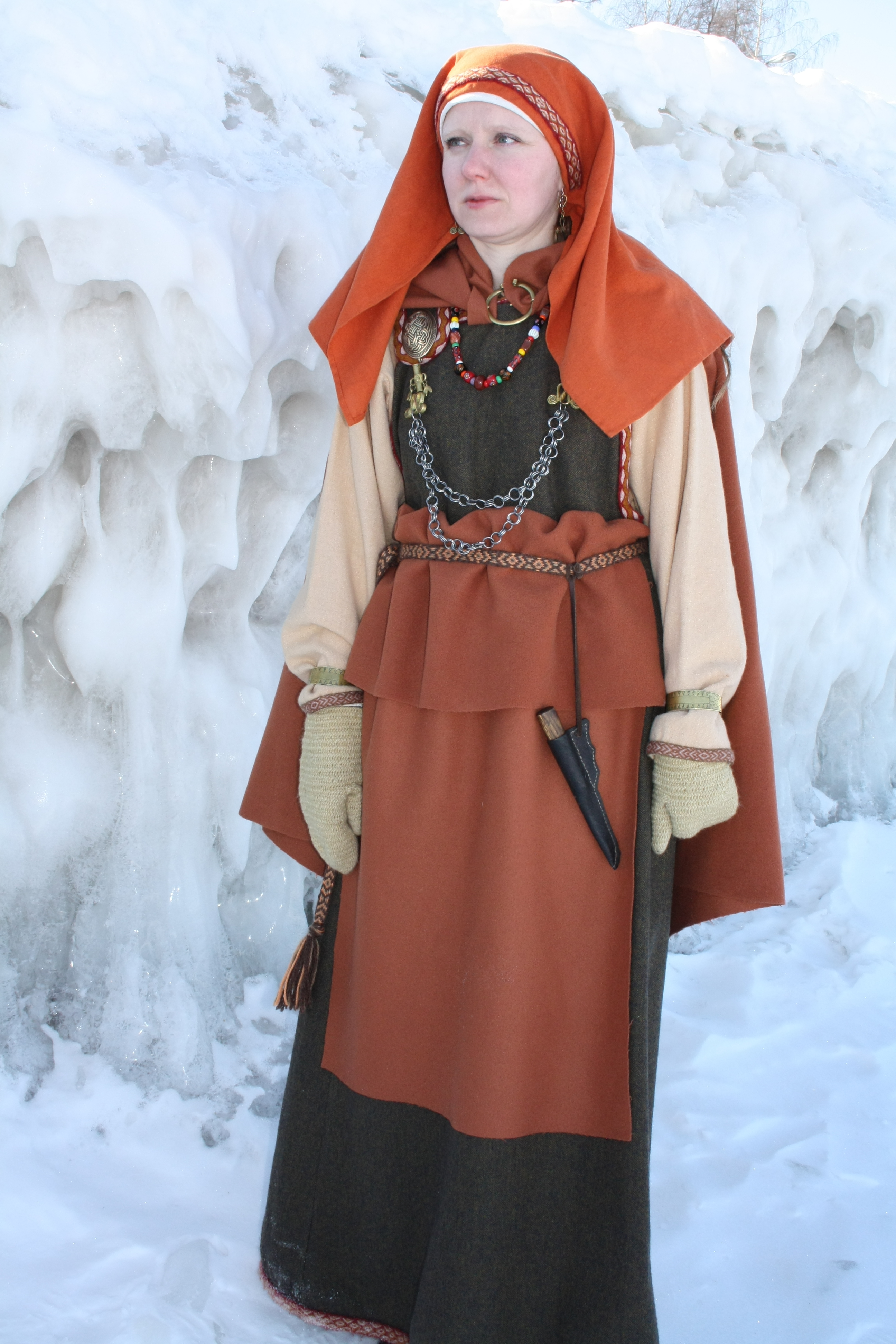 Реконструкция национального карельского женского костюма